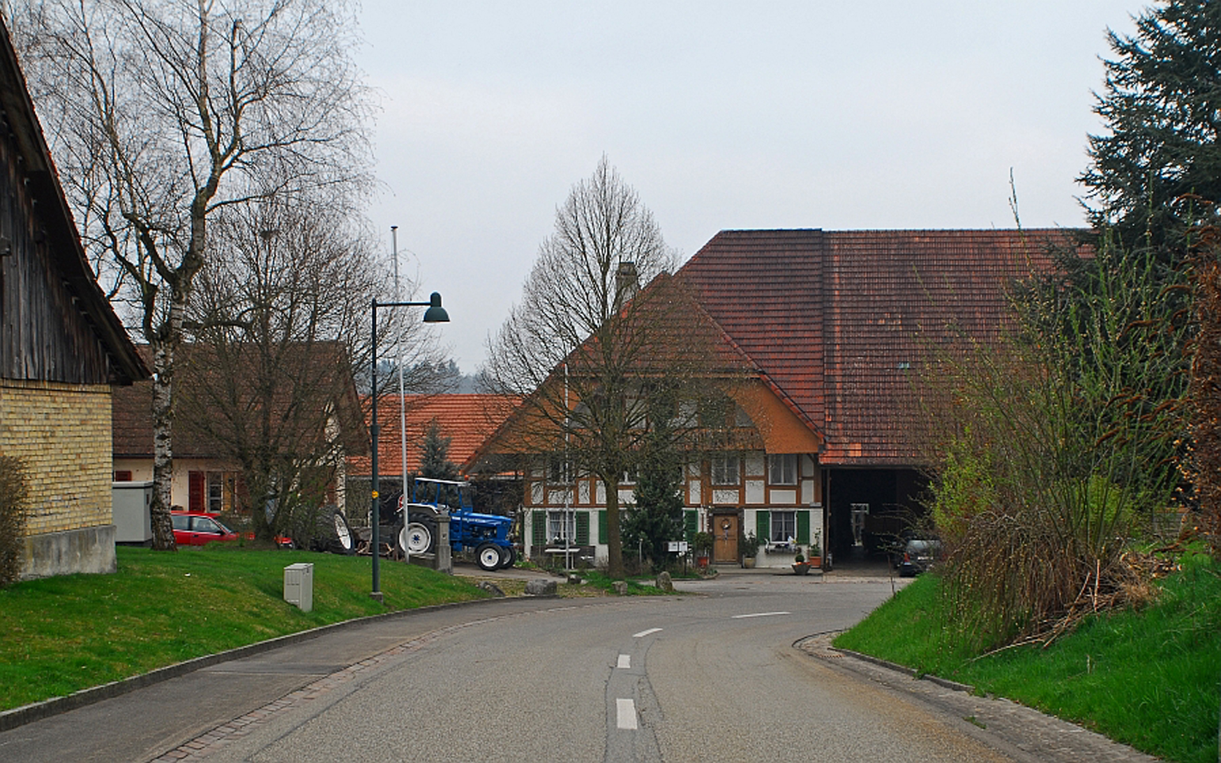 Hauptstrasse in Hersiwil